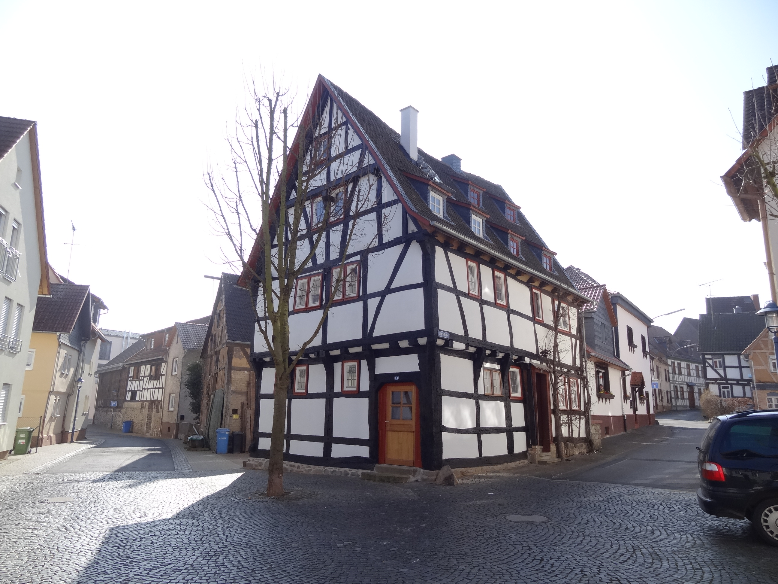 Blitzenstraße 34-36 (Hungen)